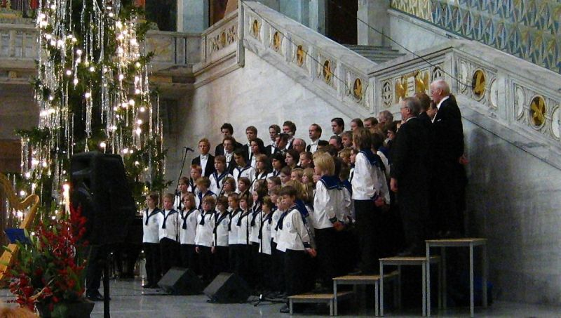 The Norwegian boys' choir Sølvguttene singing in the Oslo rådhus on December 23, 2005.